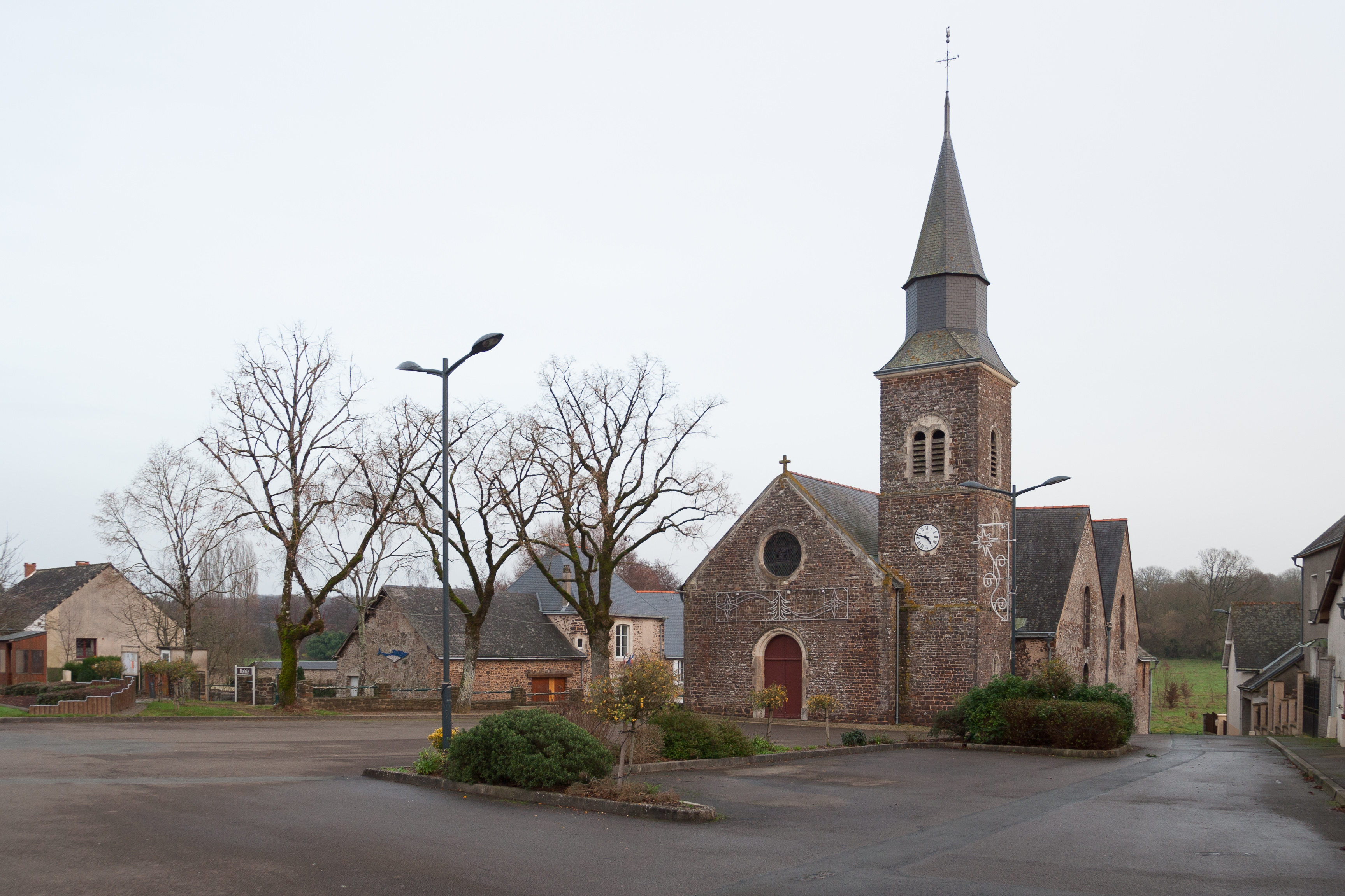 Église Saint-Pierre de Chammes en Mayenne.